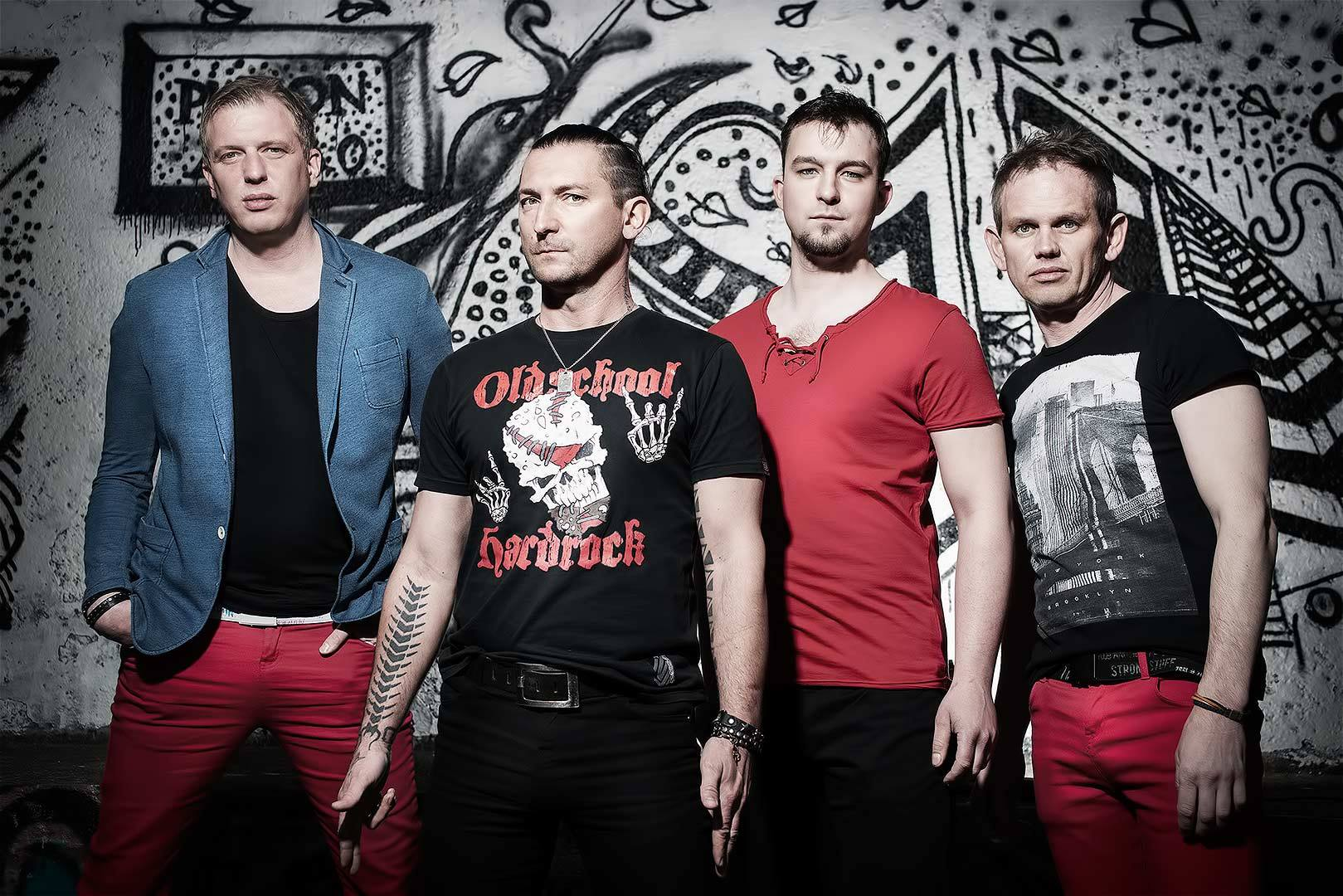 skupina premier